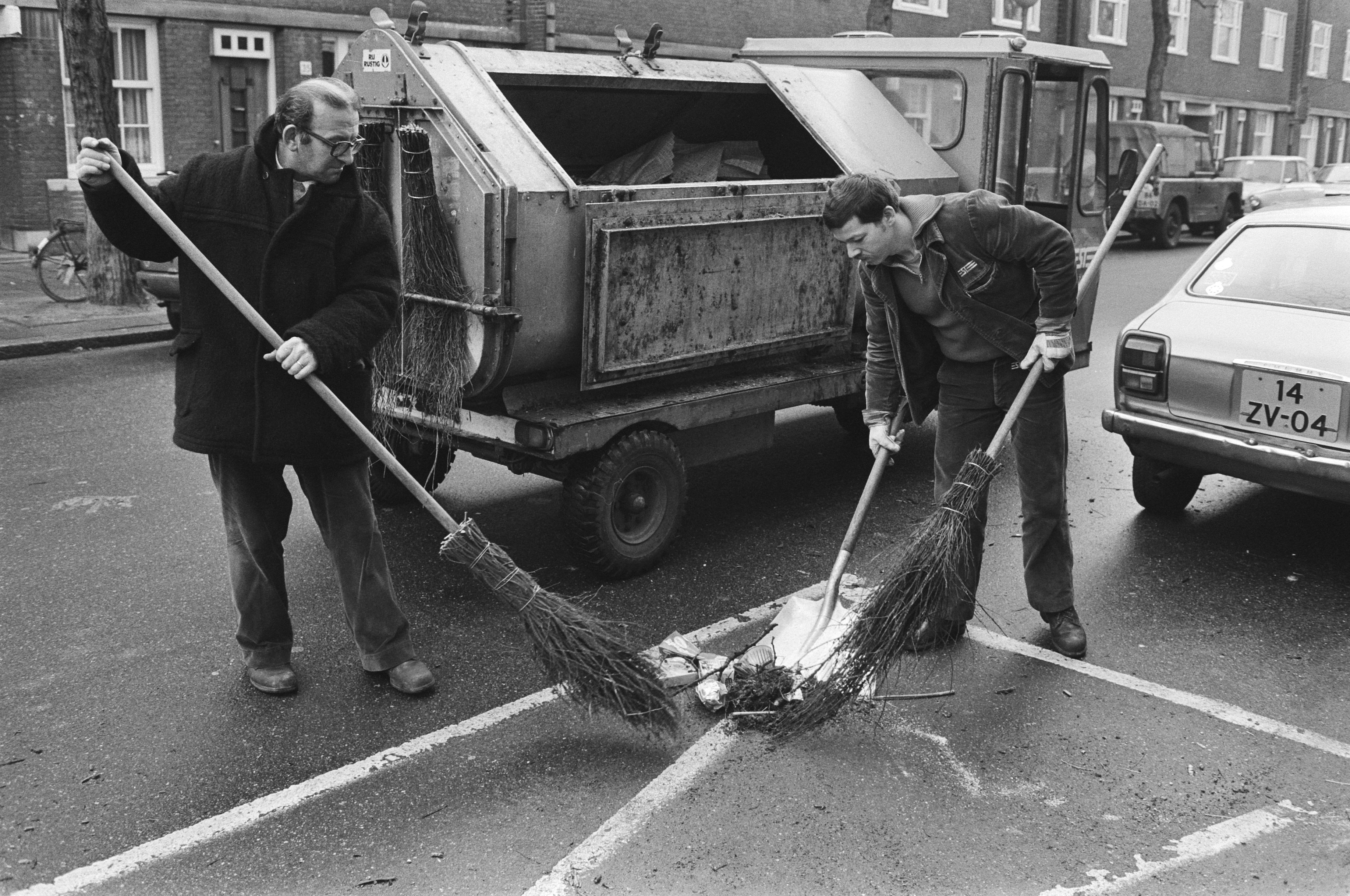 Collectie / Archief : Fotocollectie Anefo Reportage / Serie : Straatvegers van de Amsterdamse stadsreiniging aan het werk Beschrijving : Straatvegers met bezems Datum : 26 januari 1983 Locatie : Amsterdam, Noord-Holland Trefwoorden : afval, reinigingsdiensten, vrachtwagens Fotograaf : Antonisse, Marcel / Anefo Auteursrechthebbende : Nationaal Archief Materiaalsoort : Negatief (zwart/wit) Nummer archiefinventaris : bekijk toegang 2.24.01.05 Bestanddeelnummer : 932-4797